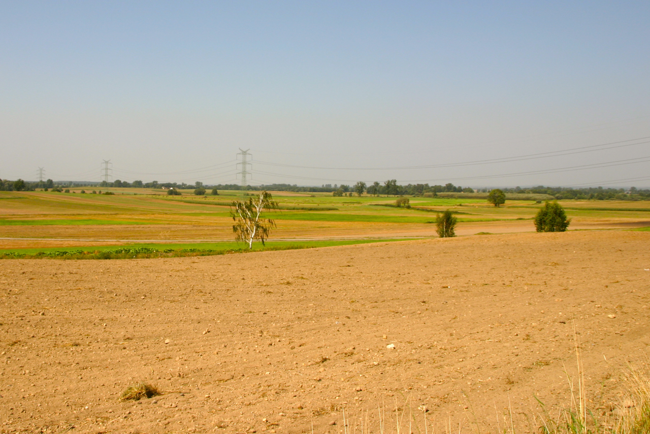 Rozkochów (dodatkowa nazwa w j. niem. Dobersdorf) - wieś w Polsce położona w województwie opolskim, w powiecie krapkowickim, w gminie Walce.